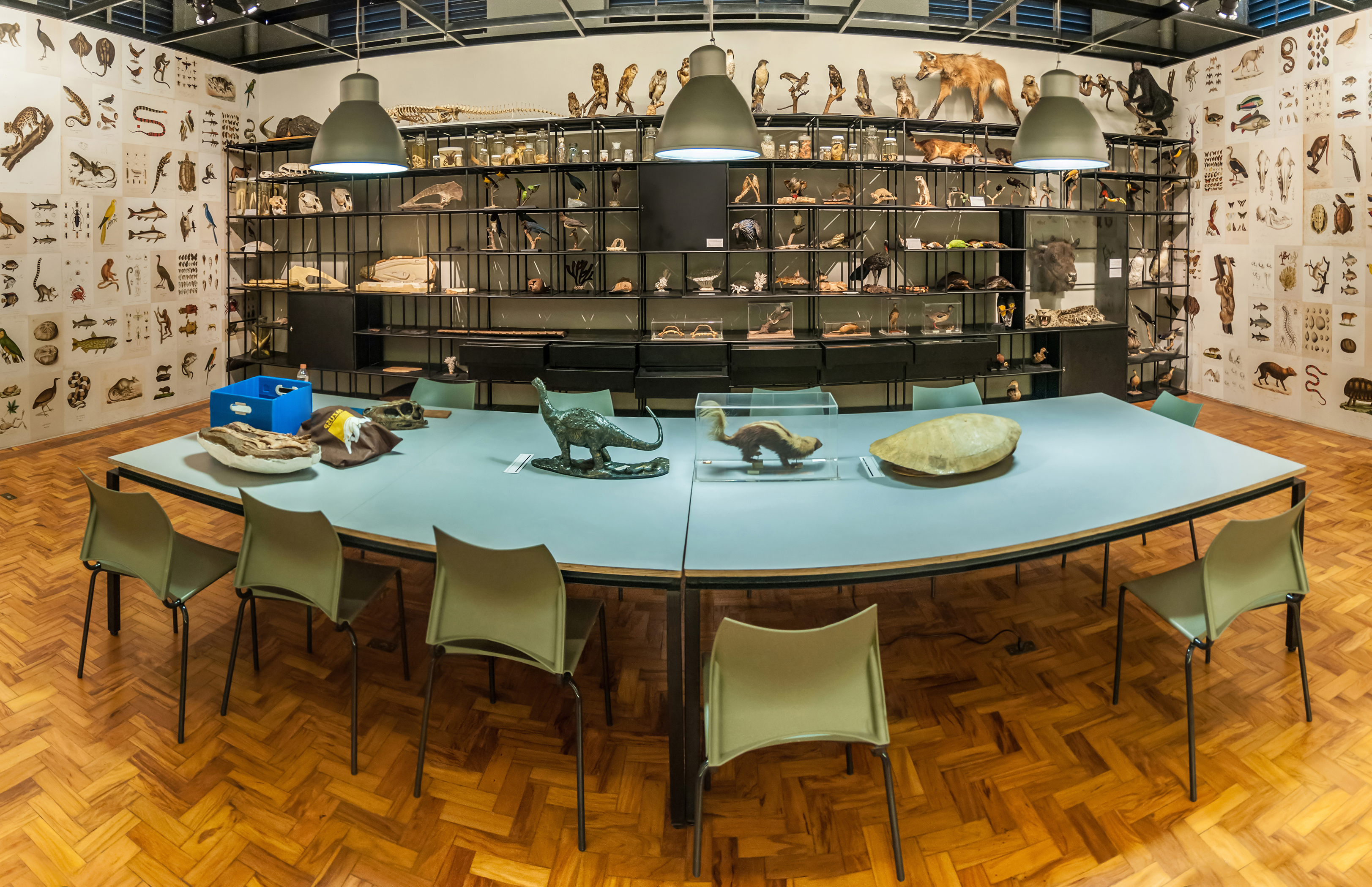 Museu de Zoologia da Universidade de São Paulo